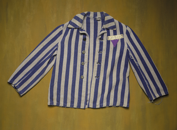 Uniforme que llevaban los Testigos de Jehová en los campos de concentración